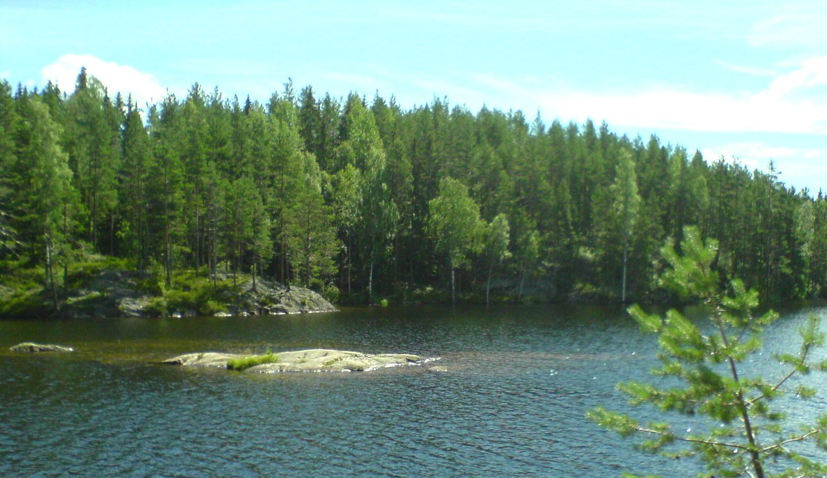 Røytjern